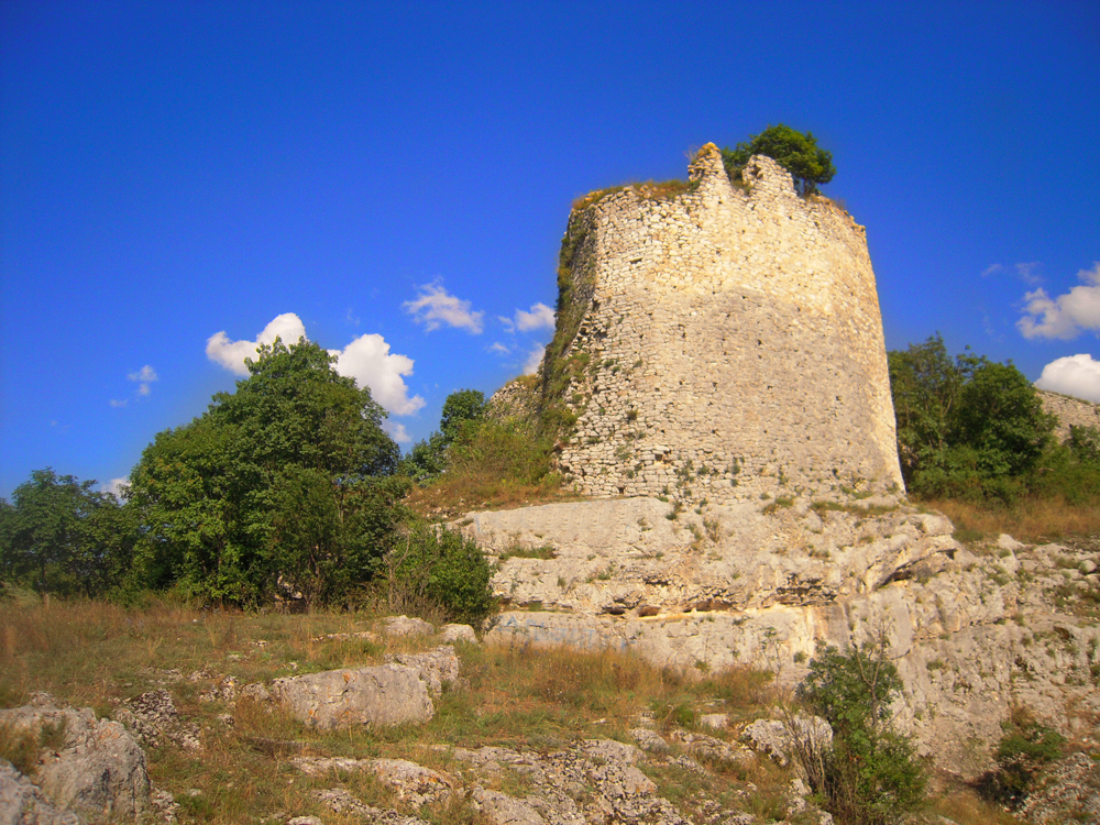 Тврђава Бочац